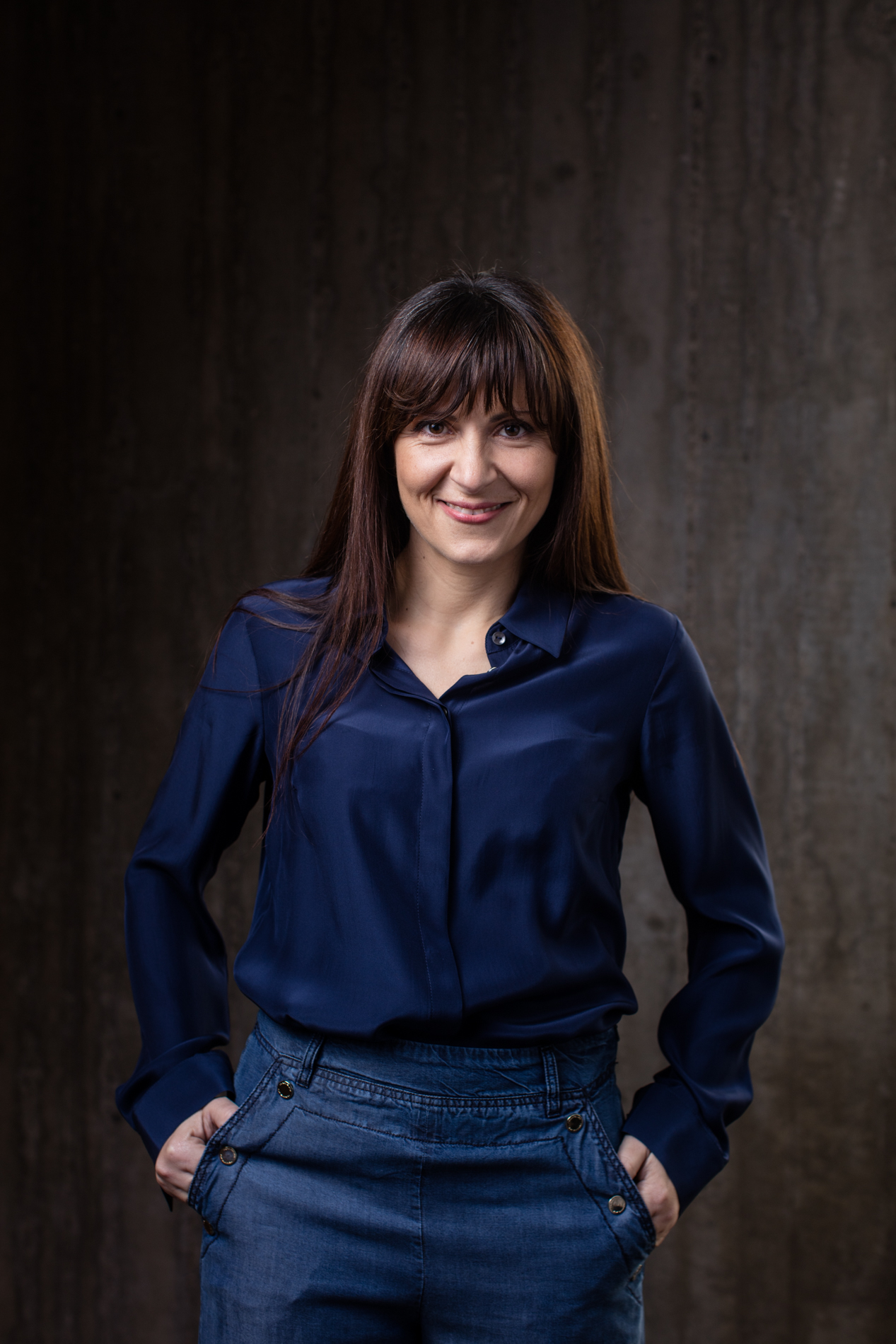 Annalisa Monfreda, direttore delle riviste Donna Moderna, Starbene e Tu Style (Mondadori).